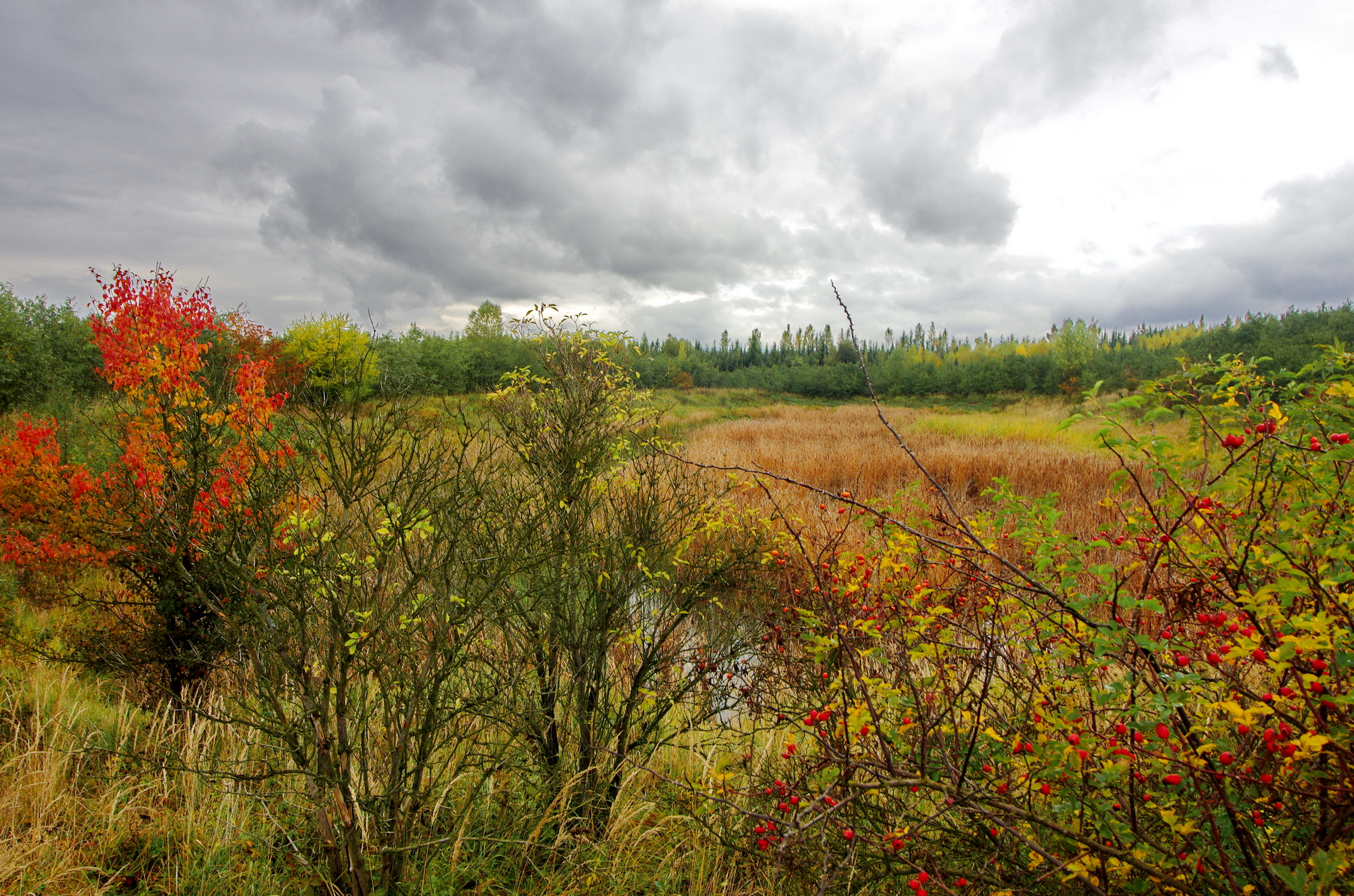 Loketská výsypka, Sokolovská pánev